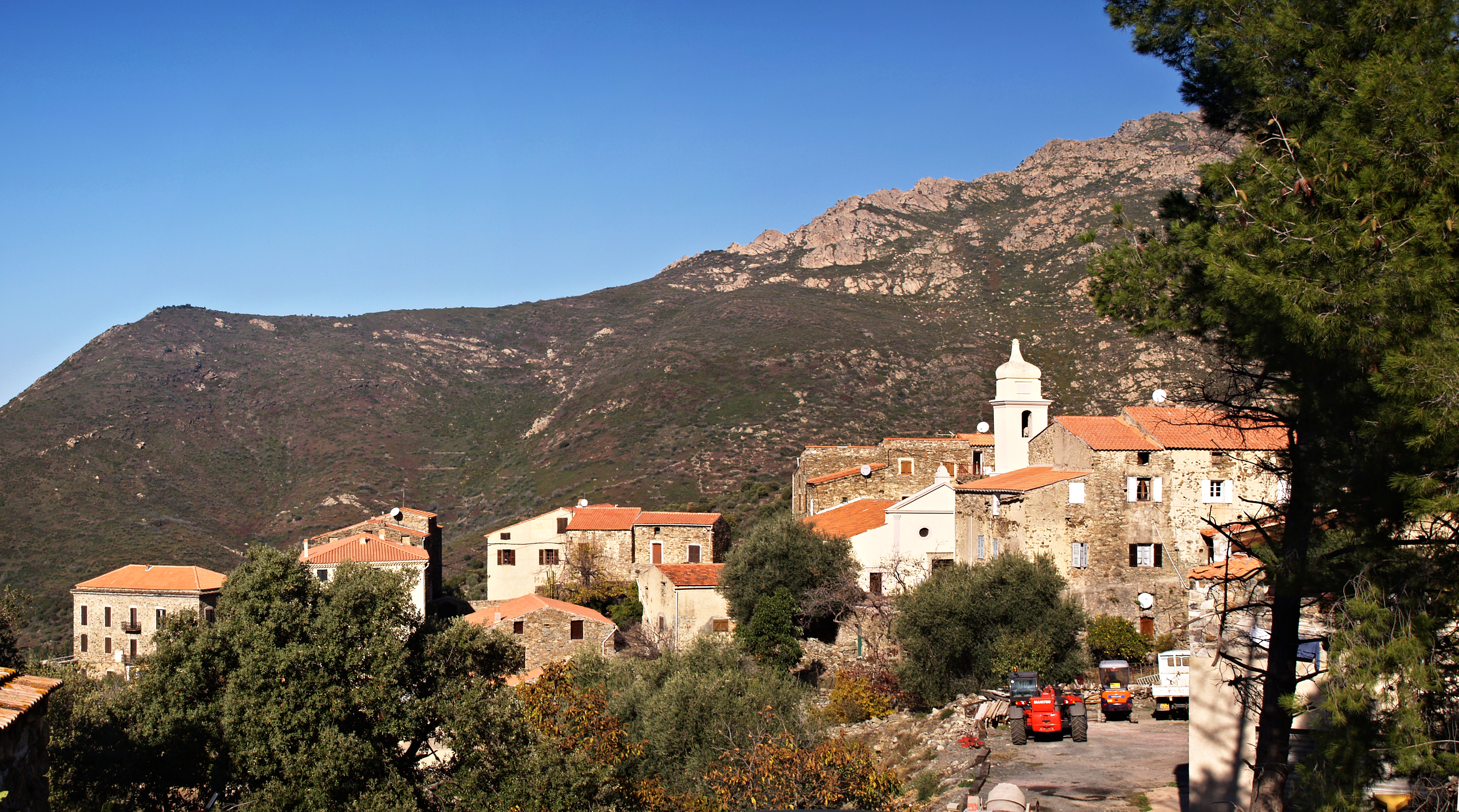 Urtaca (Corse) - Panorama du village